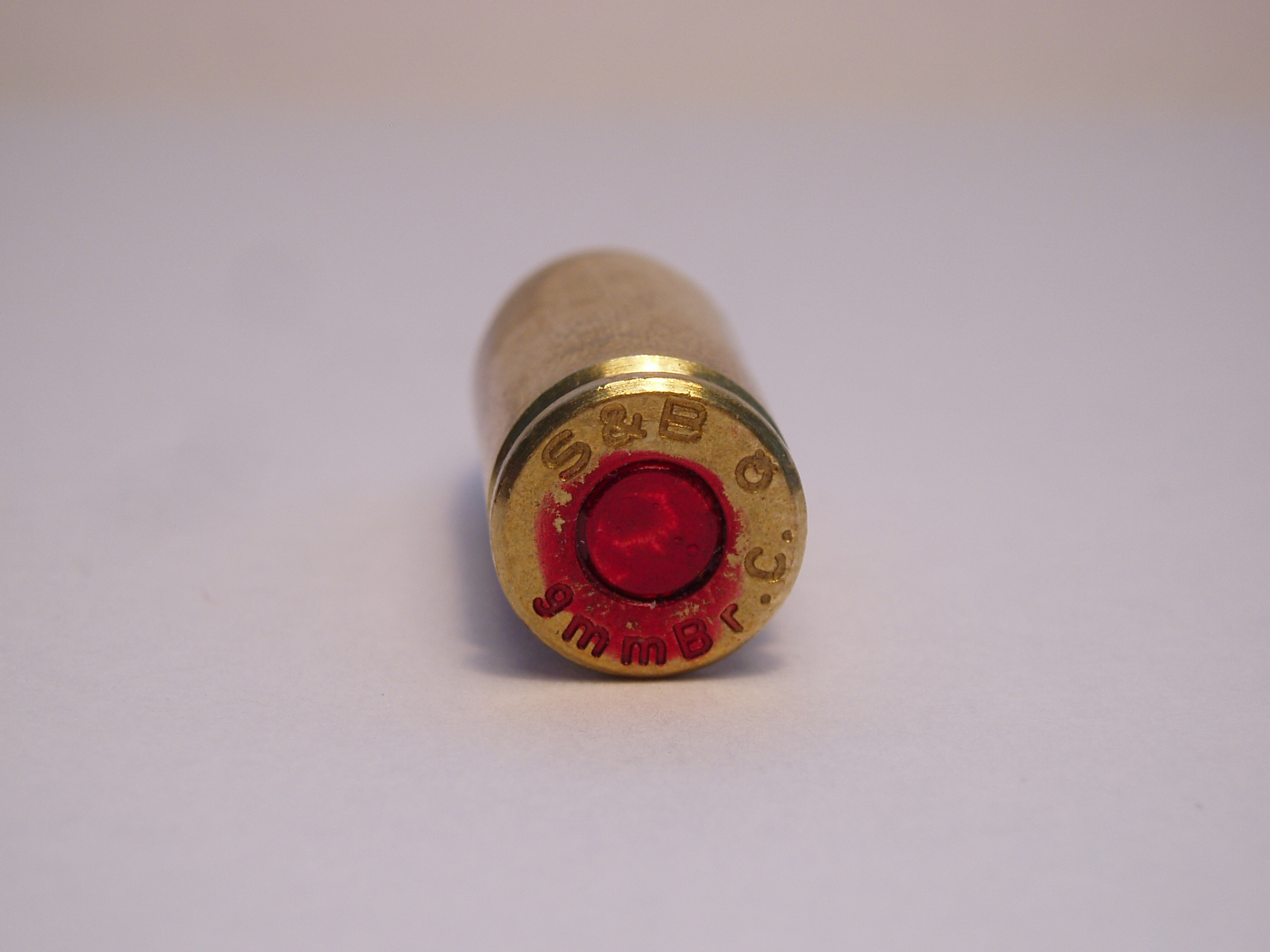 .380 ACP pistol cartrdige. FMJ bullet. Manufacturer: Sellier & Bellot.